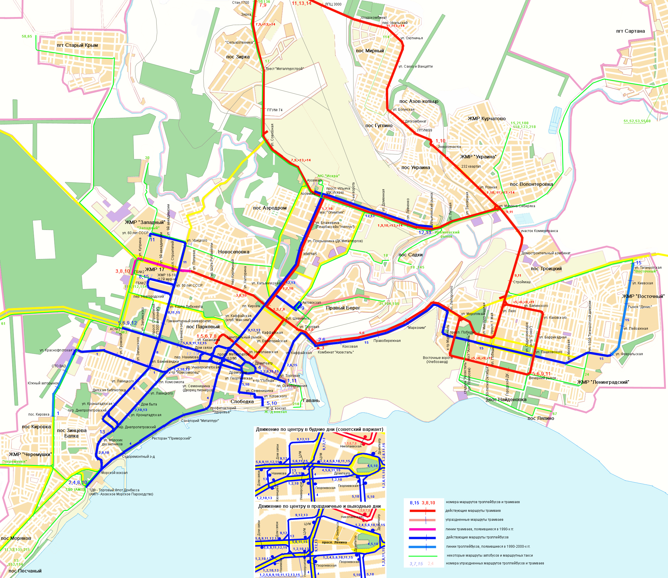 Mariupols transport map